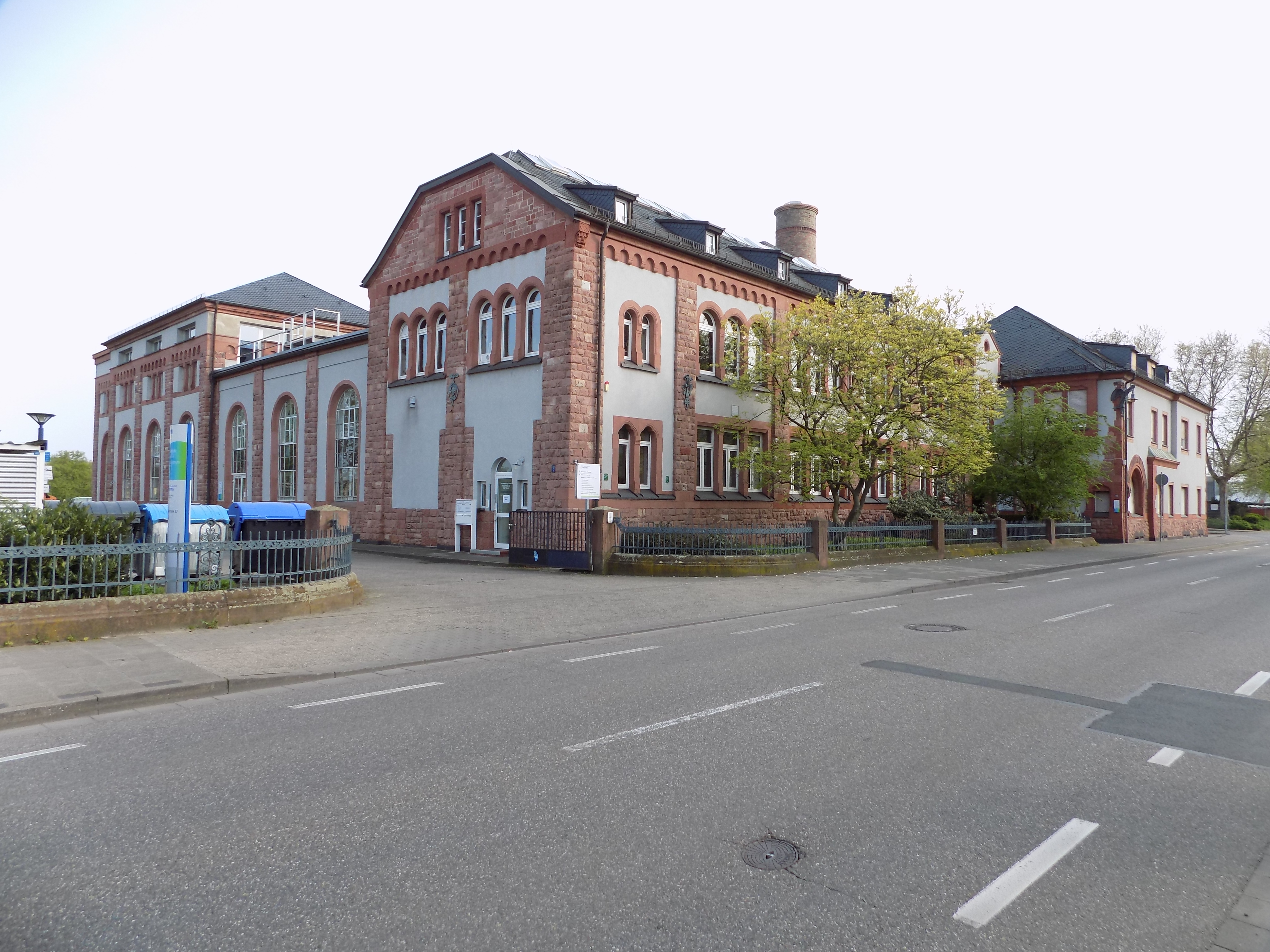 Worms – Ehemaliges Elektritzitätswerk